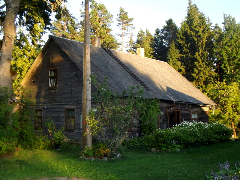 Kalešu krogs